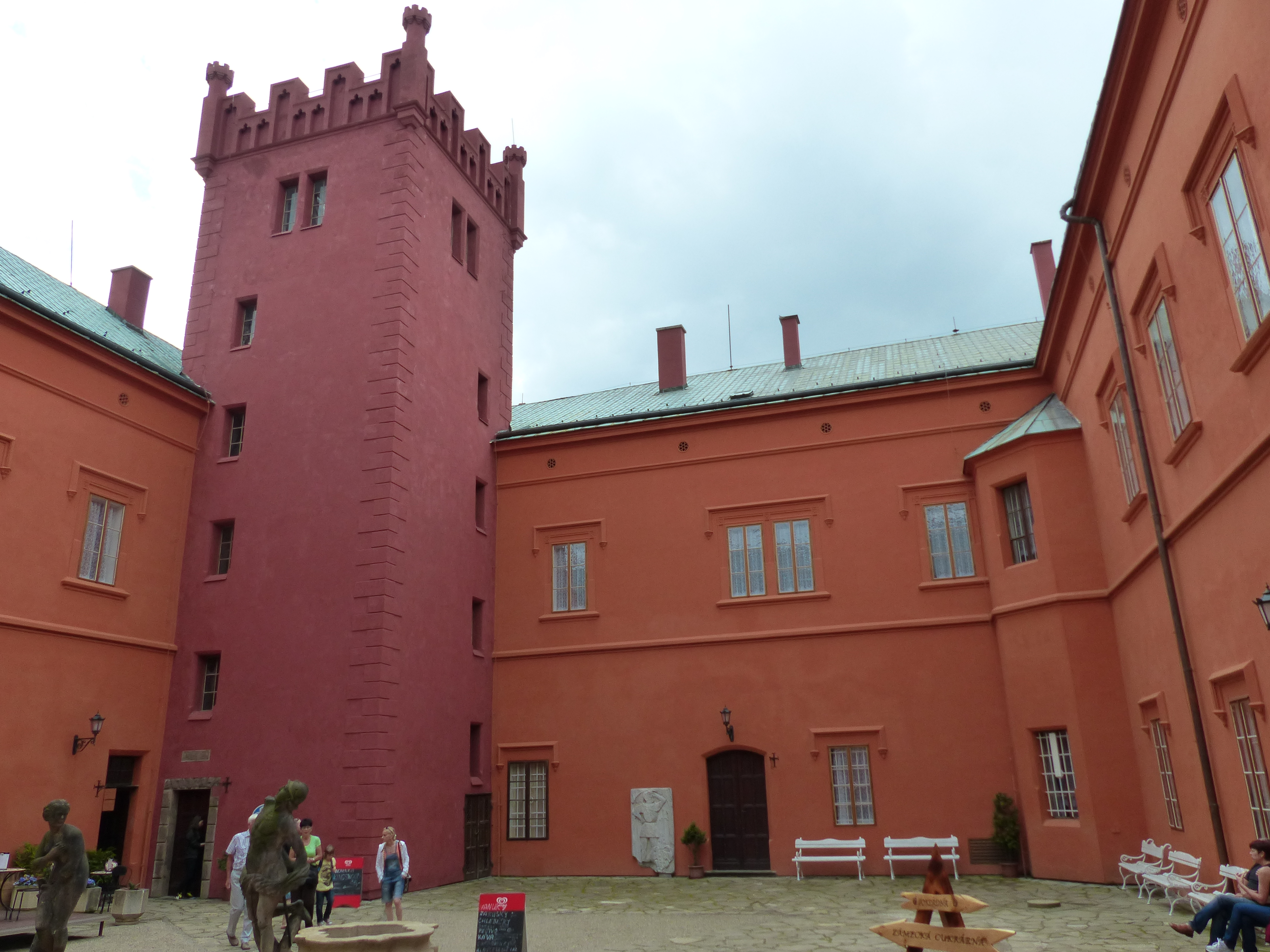 Schloss in Klösterle an der Eger